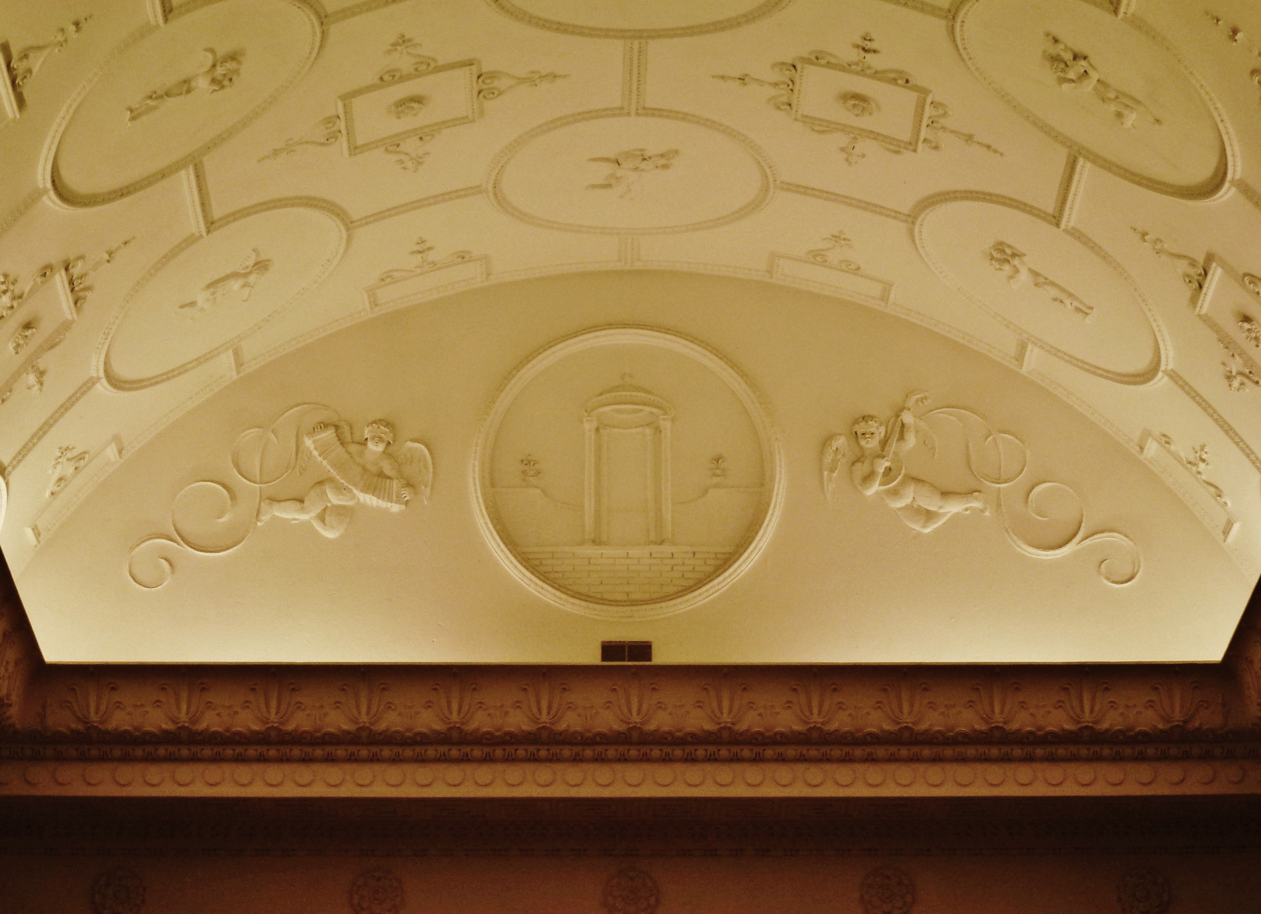 Metropolpalatset interiör